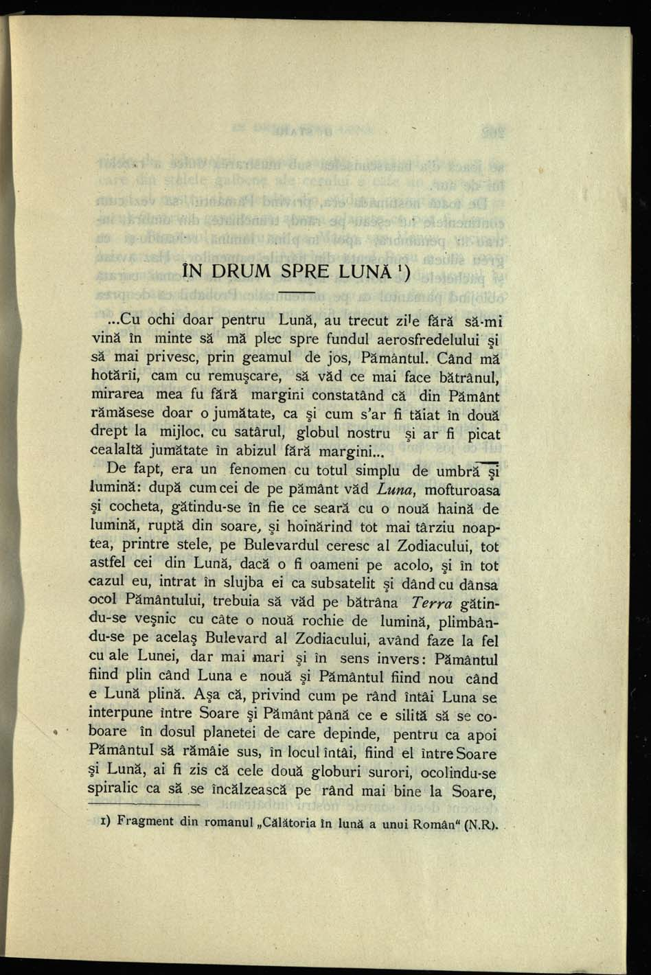 „În drum spre lună”, fragment din viitorul roman Un român în Lună (1914)